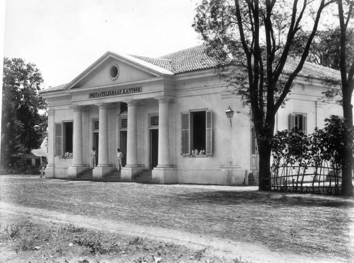 Foto. Het postkantoor in Soerabaja, Java.